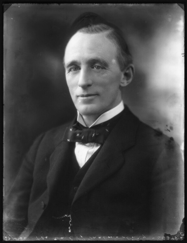 Lord Malmesbury